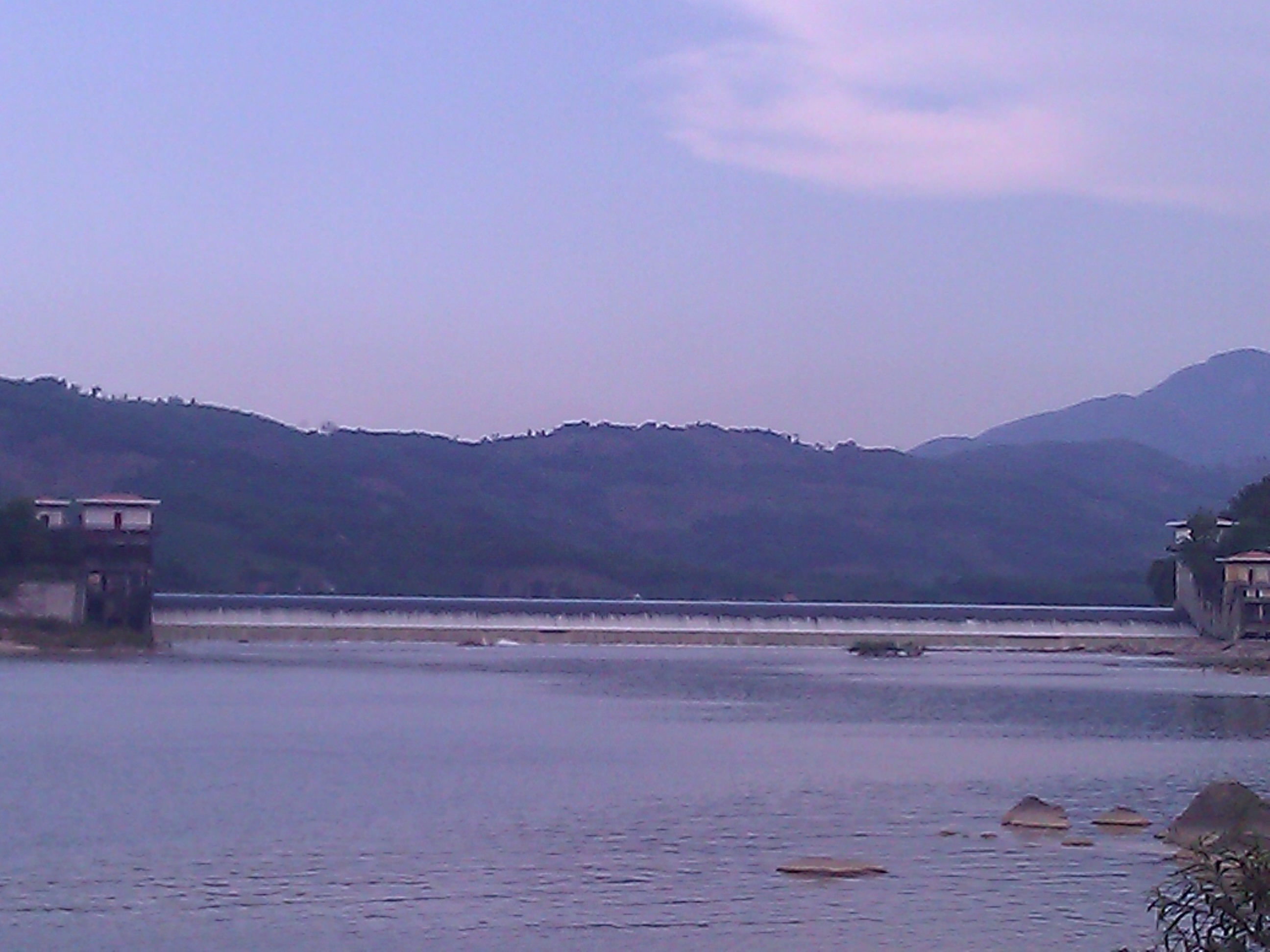 Đập Thạch Nham (Sơn Nham-Sơn Hà-Quảng Ngãi)